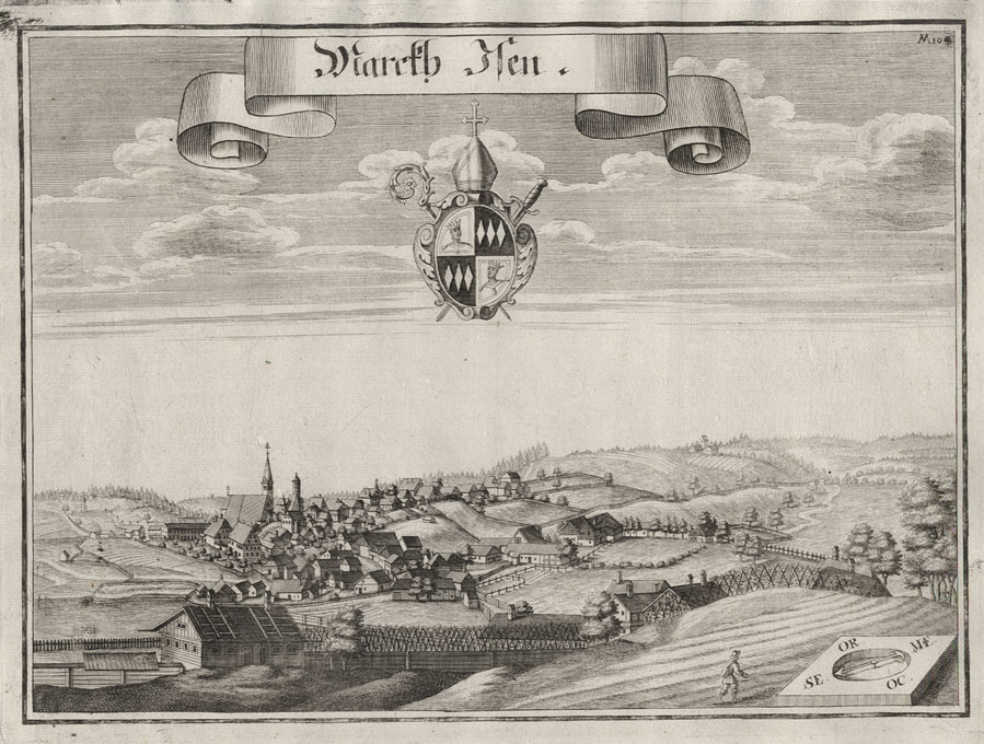 Stich von Michael Wening: Marcth Isen um 1700.